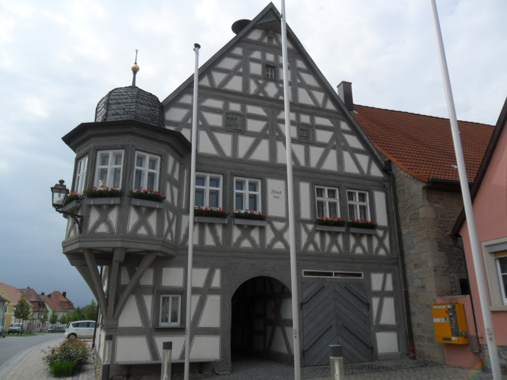 Deitsch: Rathaus von 1664